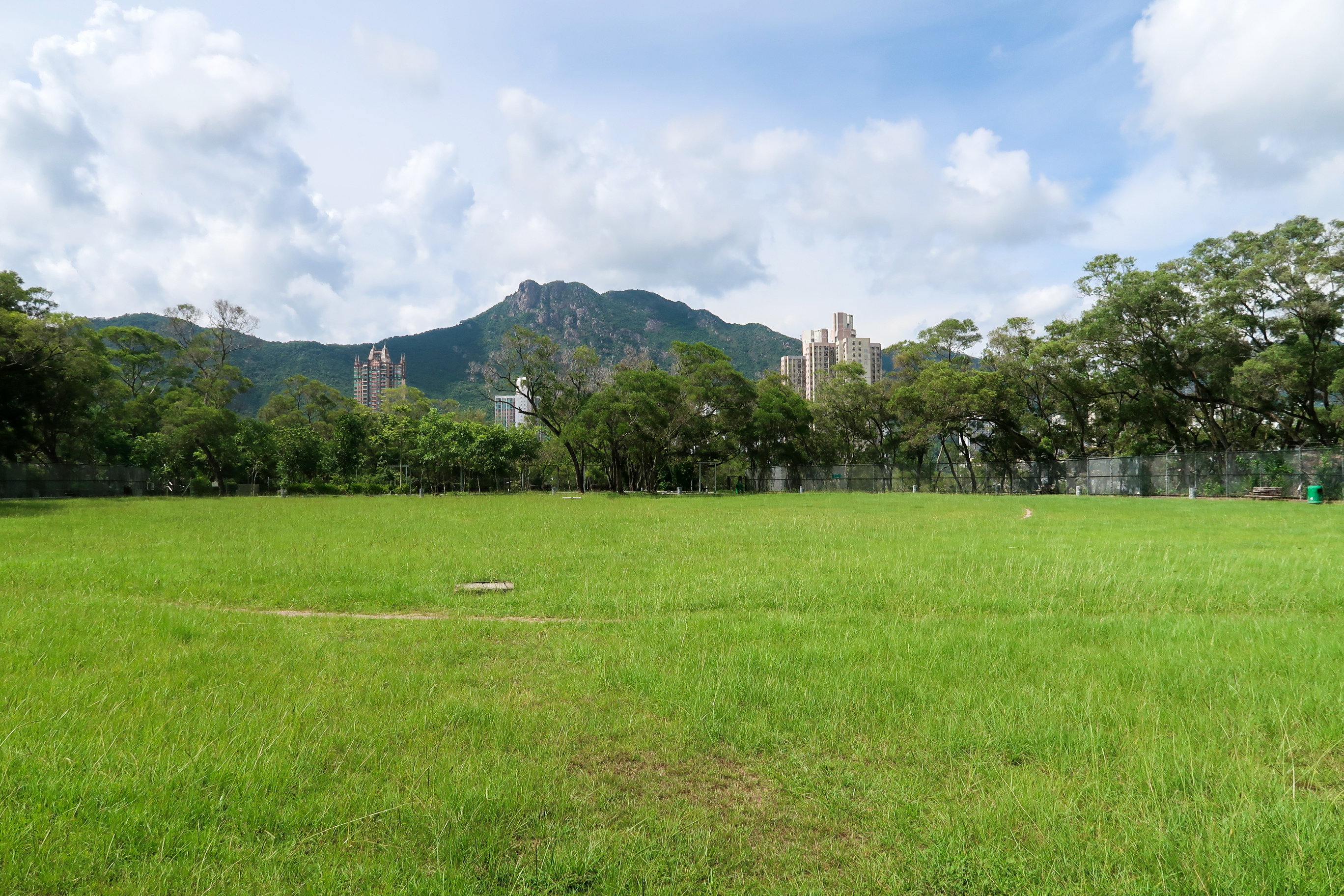 Lok Fu Service Reservoir Rest Garden